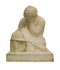 Photo : pixis. Autorisation de l'ayant-droit pour wikipedia. Autorisation-OTRS-GFDL|otrs=2006072710012609|auteur=Rose-Hélène Iché